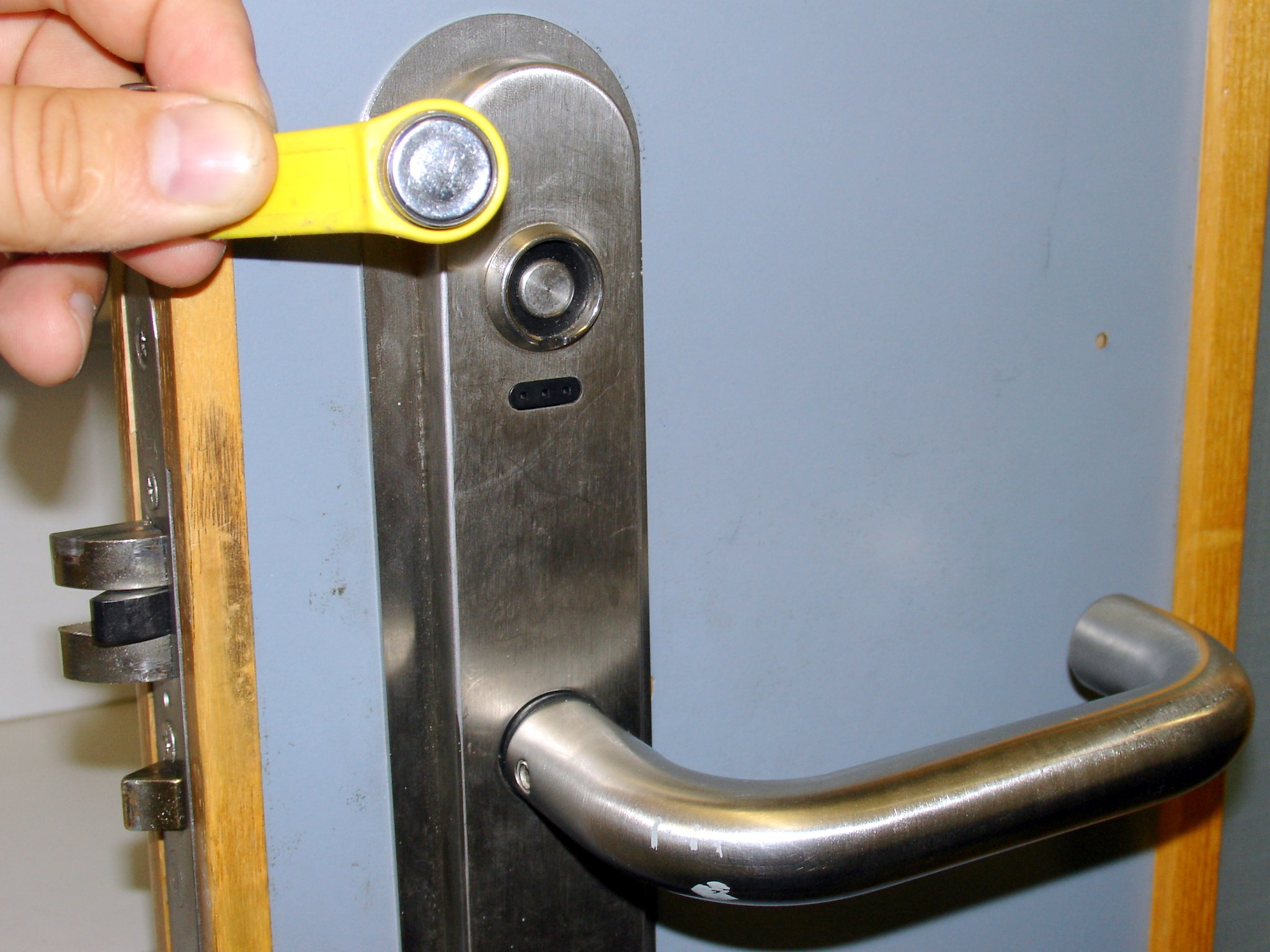 iButton (1-Wire) lock and key iButton - zamek i klucz używający protokołu 1-Wire